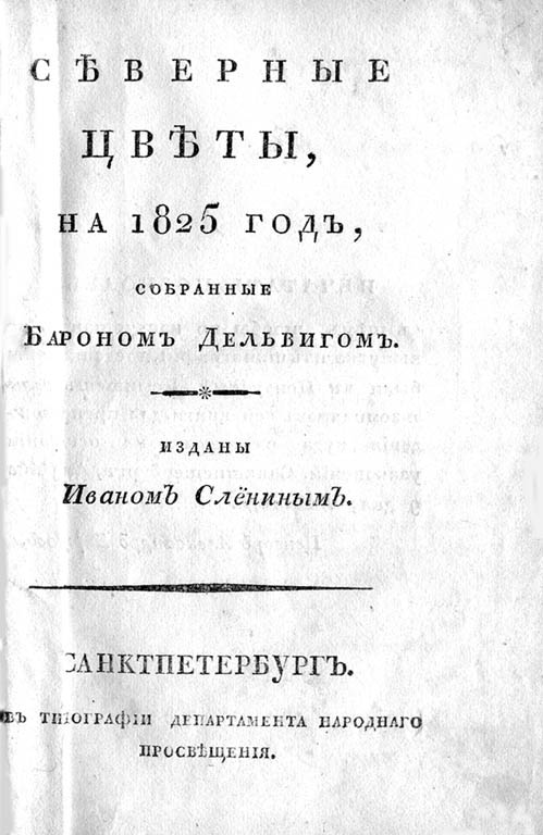 Титульный лист изданного А. А. Дельвигом альманаха "Северные цветы" на 1825 год.